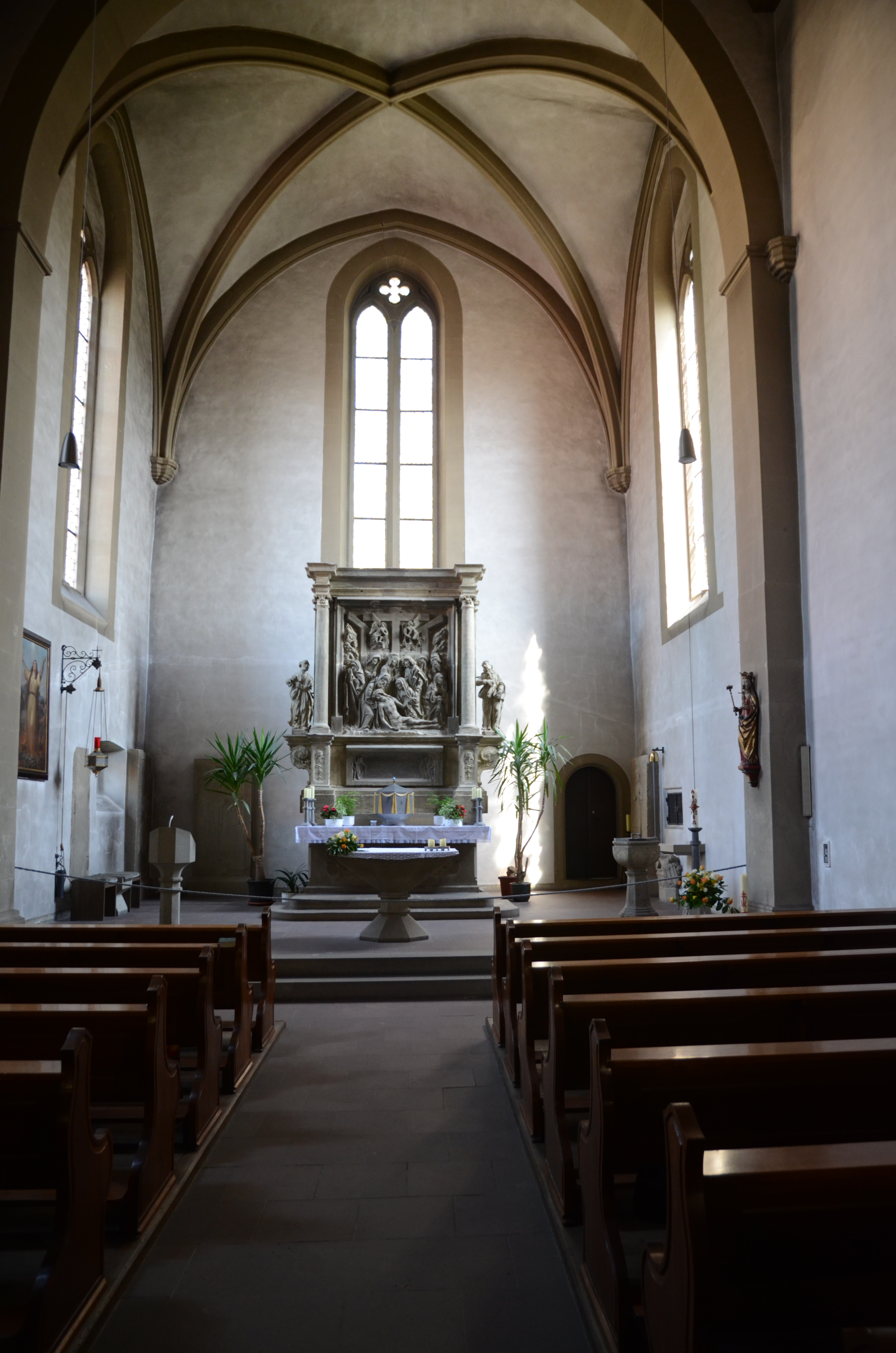 Maidbronn kath. Kirche St. Afra